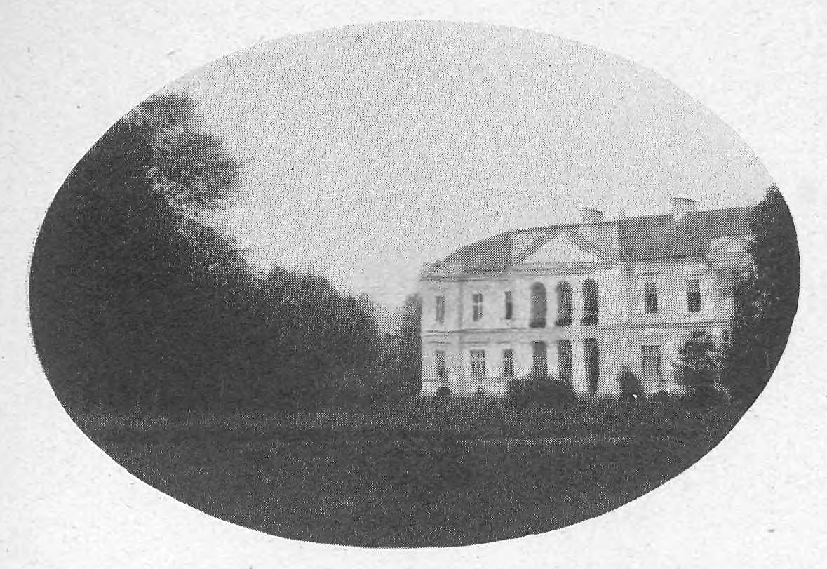 Беларуская (тарашкевіца): Бацэвічы (Bacevičy), сядзіба Незабытоўскіх (Niezabytoŭski)